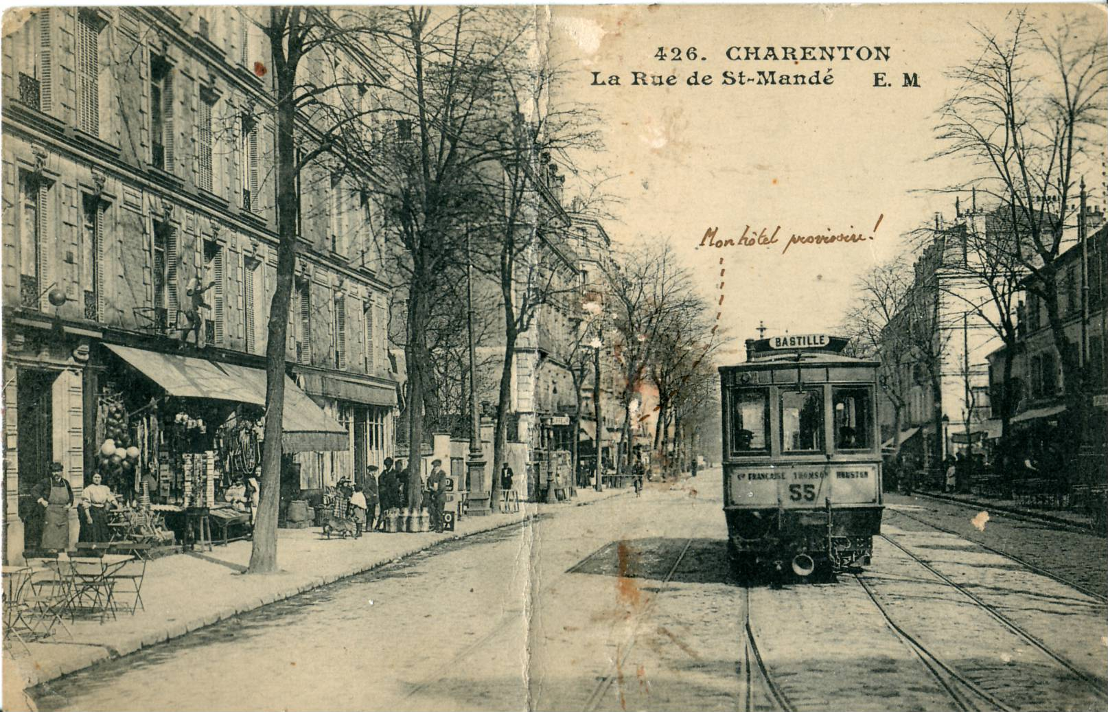 Carte postale ancienne éditée par EM, N°426Charenton (Val-de-Marne) : La rue de Saint-MandéVue en gros plan d'un tramway de la ligne de La Bastille.